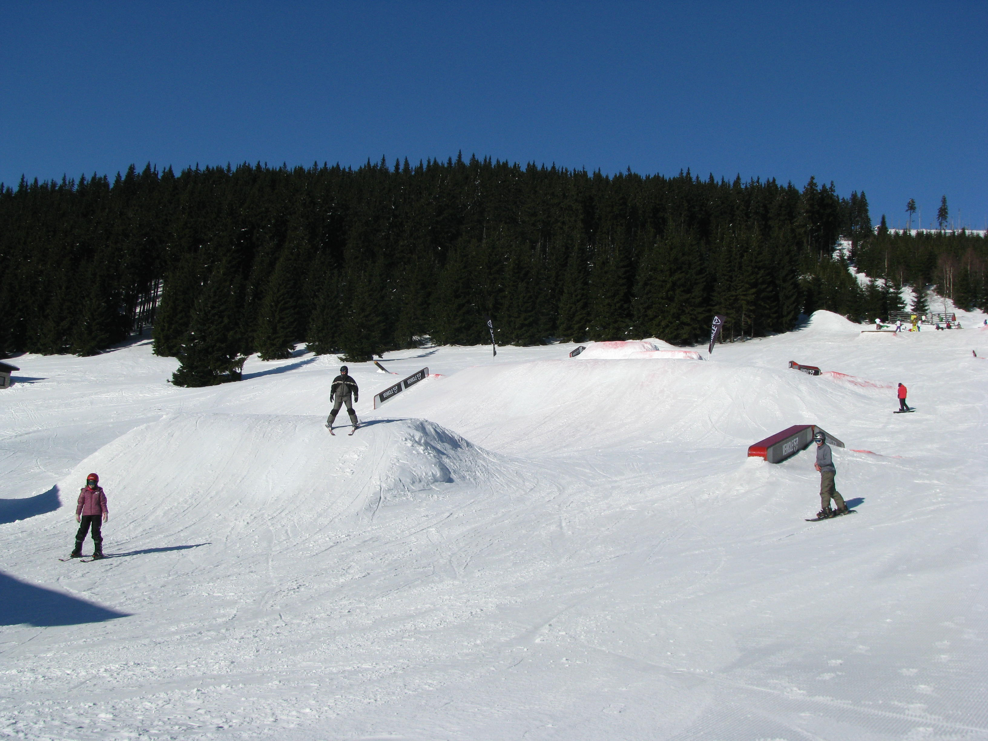 סנופארק באתר הסקי שפינדלרוב מלין